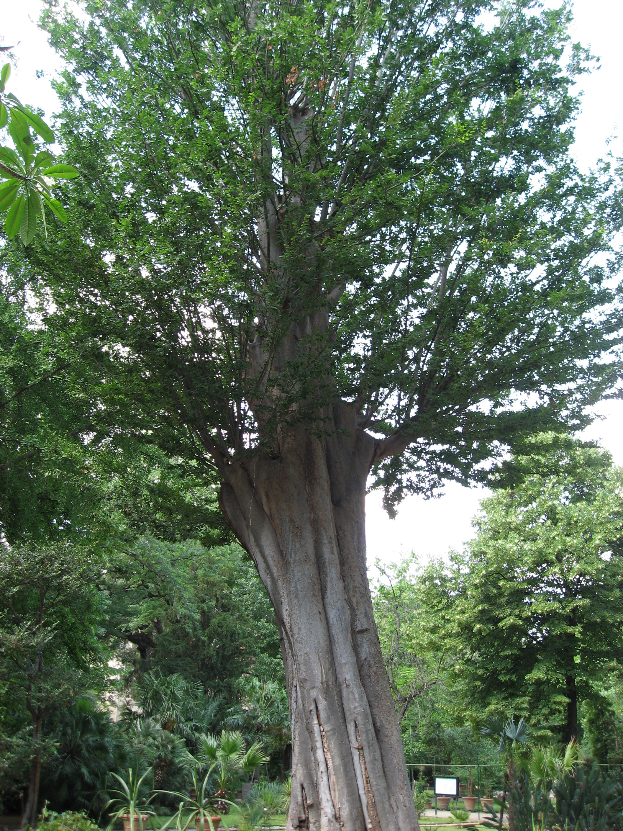 Zelkova carpinifolia (syn. Z. crenata) in Giardino dei Semplici di Firenze Map: 43° 46' 45" N 11° 15' 39" E